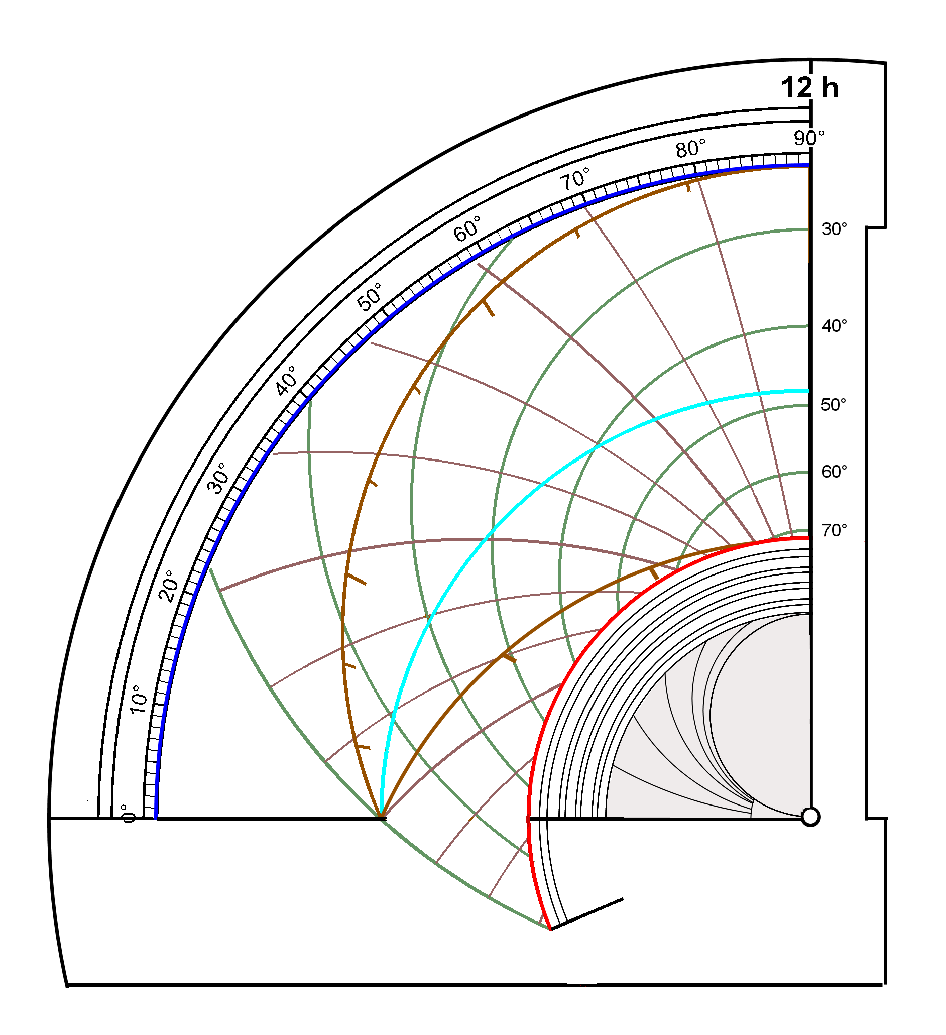 Quadrant ottoman simplifié sans tracé des heures de prière.